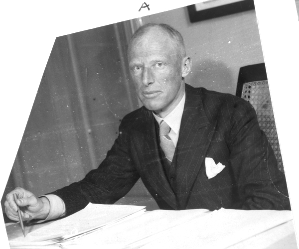 portrett, mann, jurist, riksmeglingsmann, sittende halvfigur ved skrivebord.